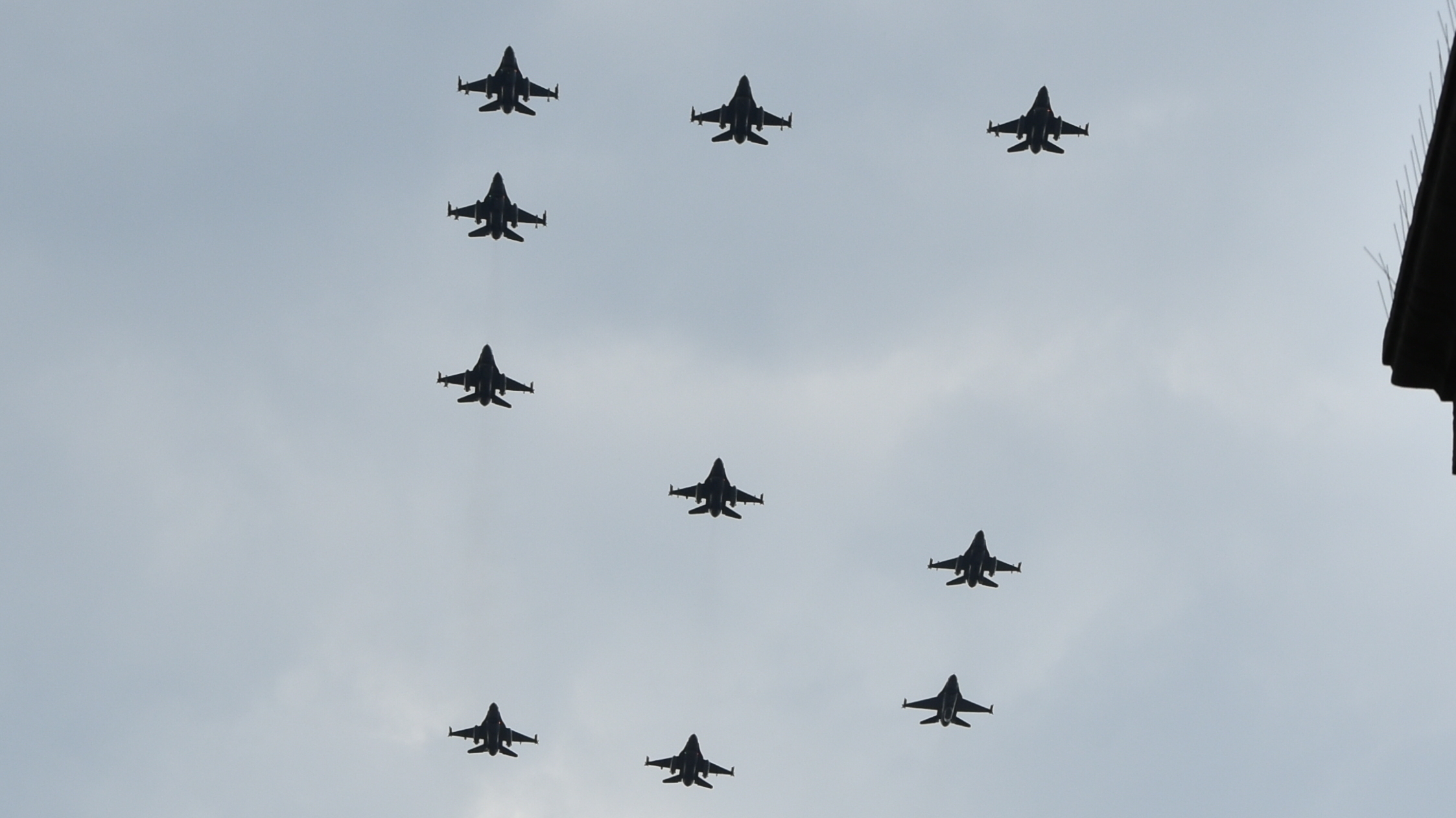 F-16's vormen cijfer 5 (vijfjarig koningschap van Filip) - Nationaal defilé 2018 21-07-2018 16-27-59 This photo of immaterial heritage has been taken in the Brussels Capital Region